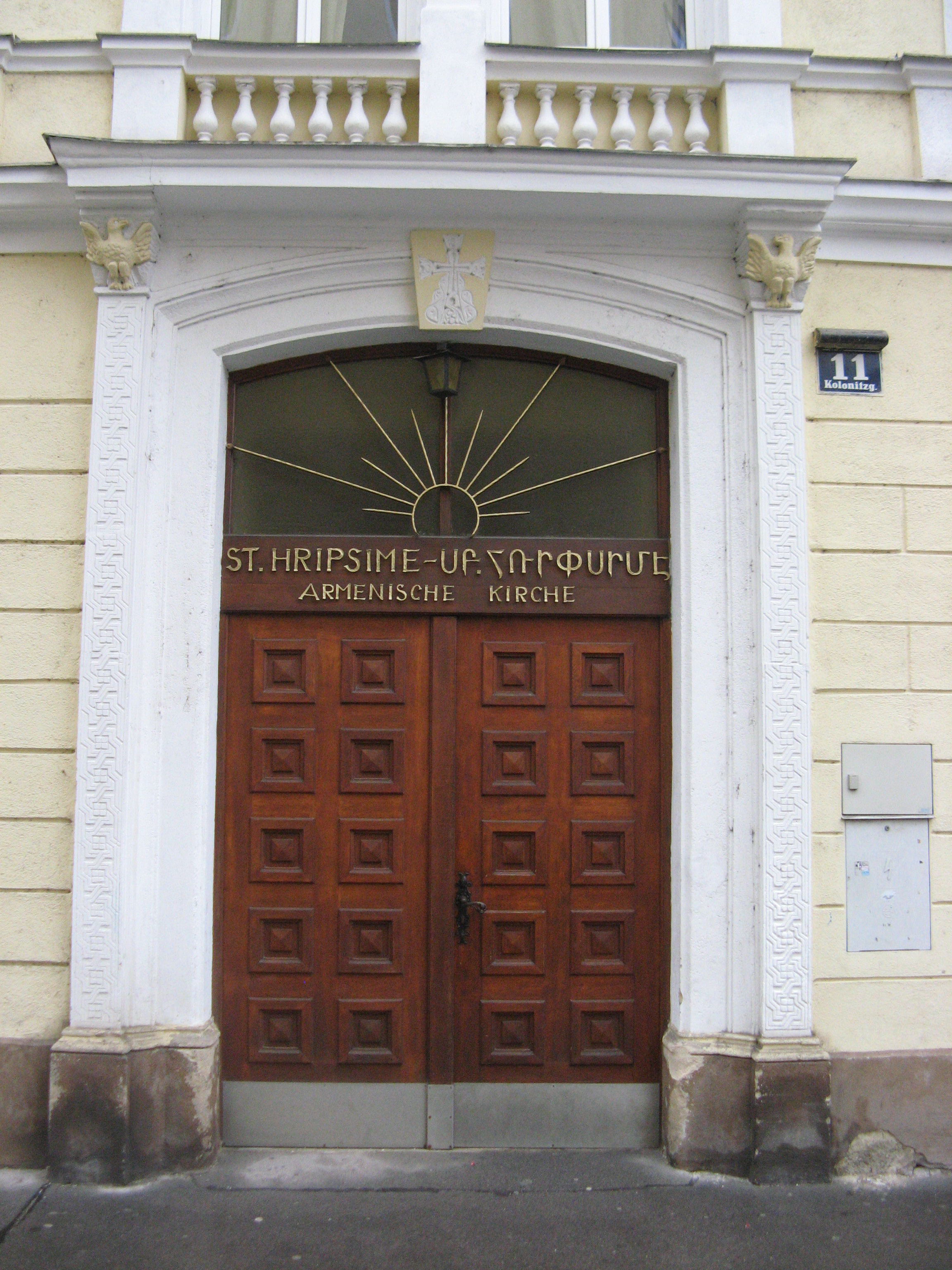 Armenische Kirche St. Hripsime, Haustor, Kolonitzgasse 11, Wien-Landstraße